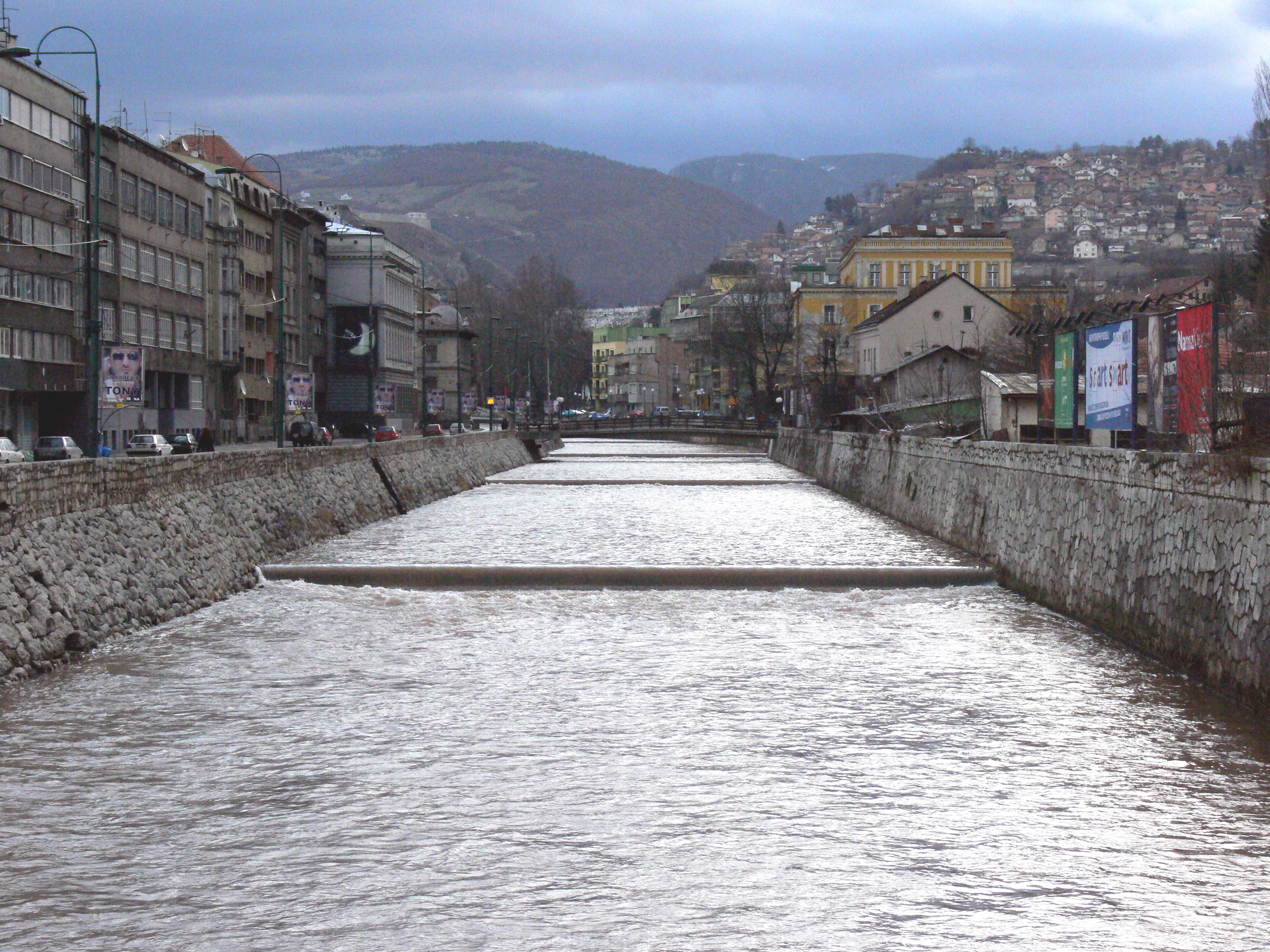 The river Miljacka in Sarajevo.